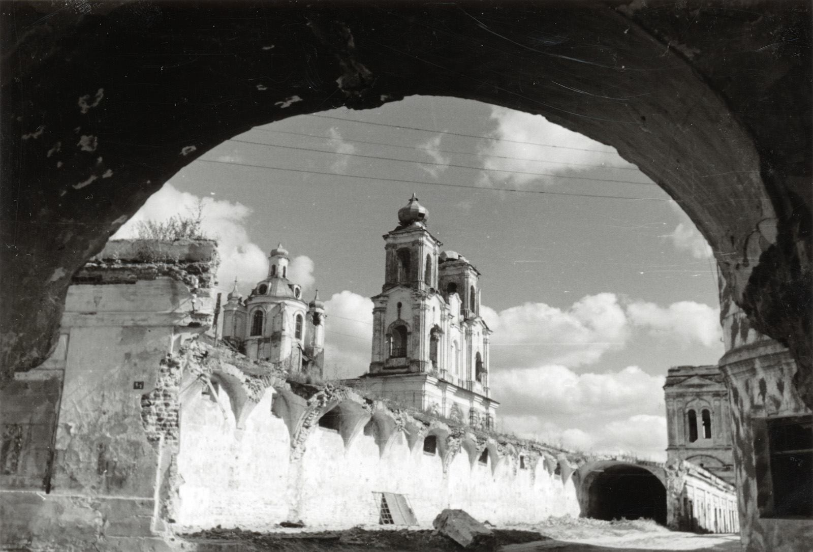 Магілёўскі Спаскі манастыр у 1942 годзе